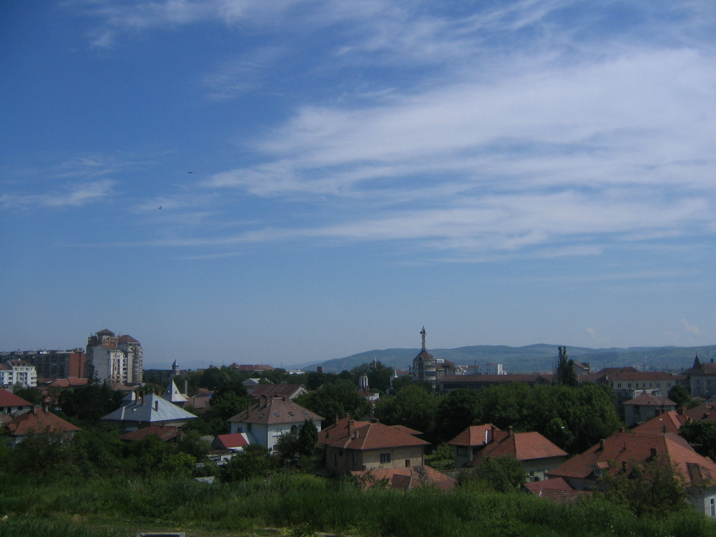 Vedere generală asupra zonei centru a oraşului Alba Iulia